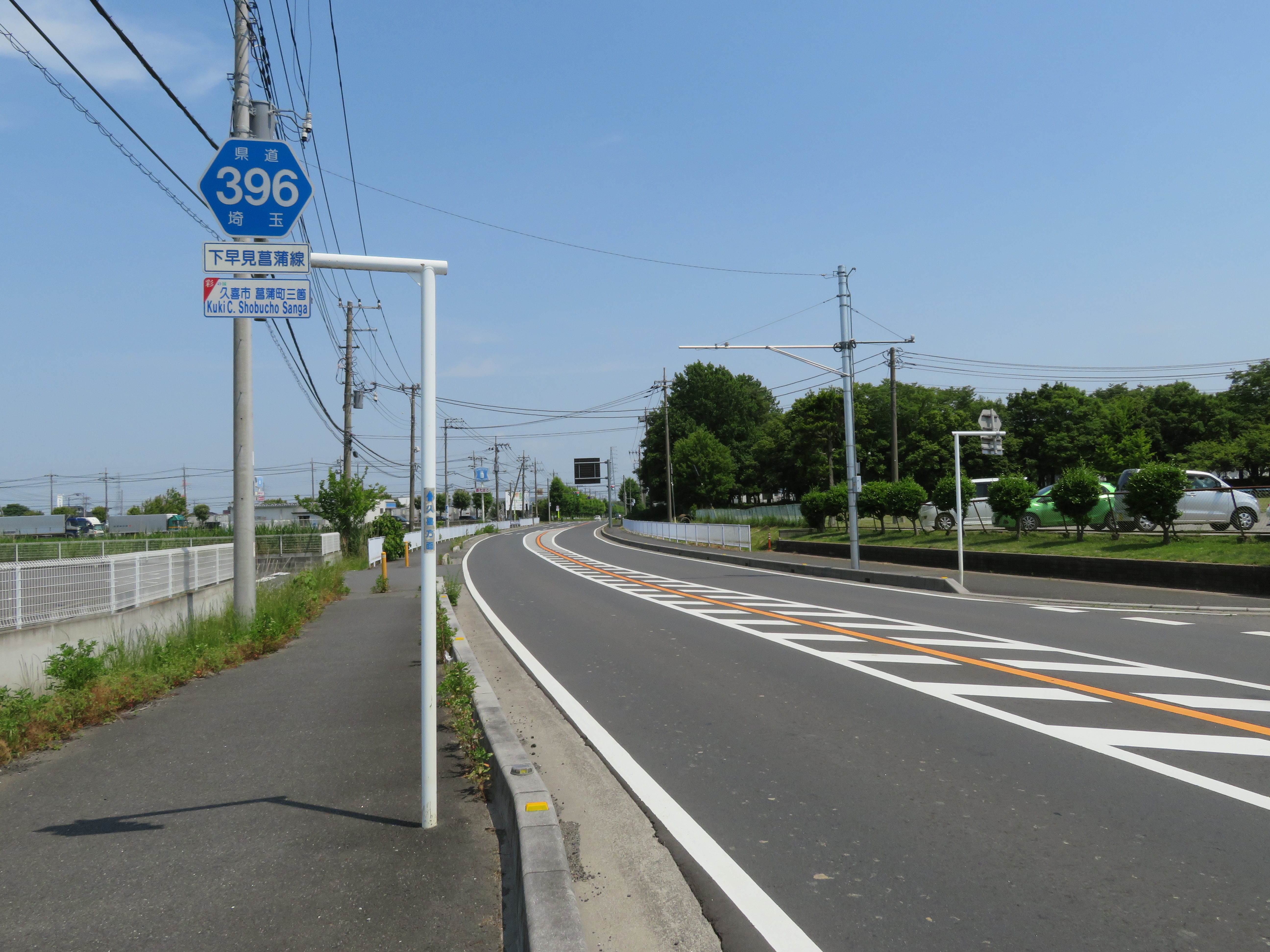 埼玉県道396号線久喜市菖蒲町三箇付近（久喜インターチェンジ方面を撮影） Canon PowerShot SX720 HS